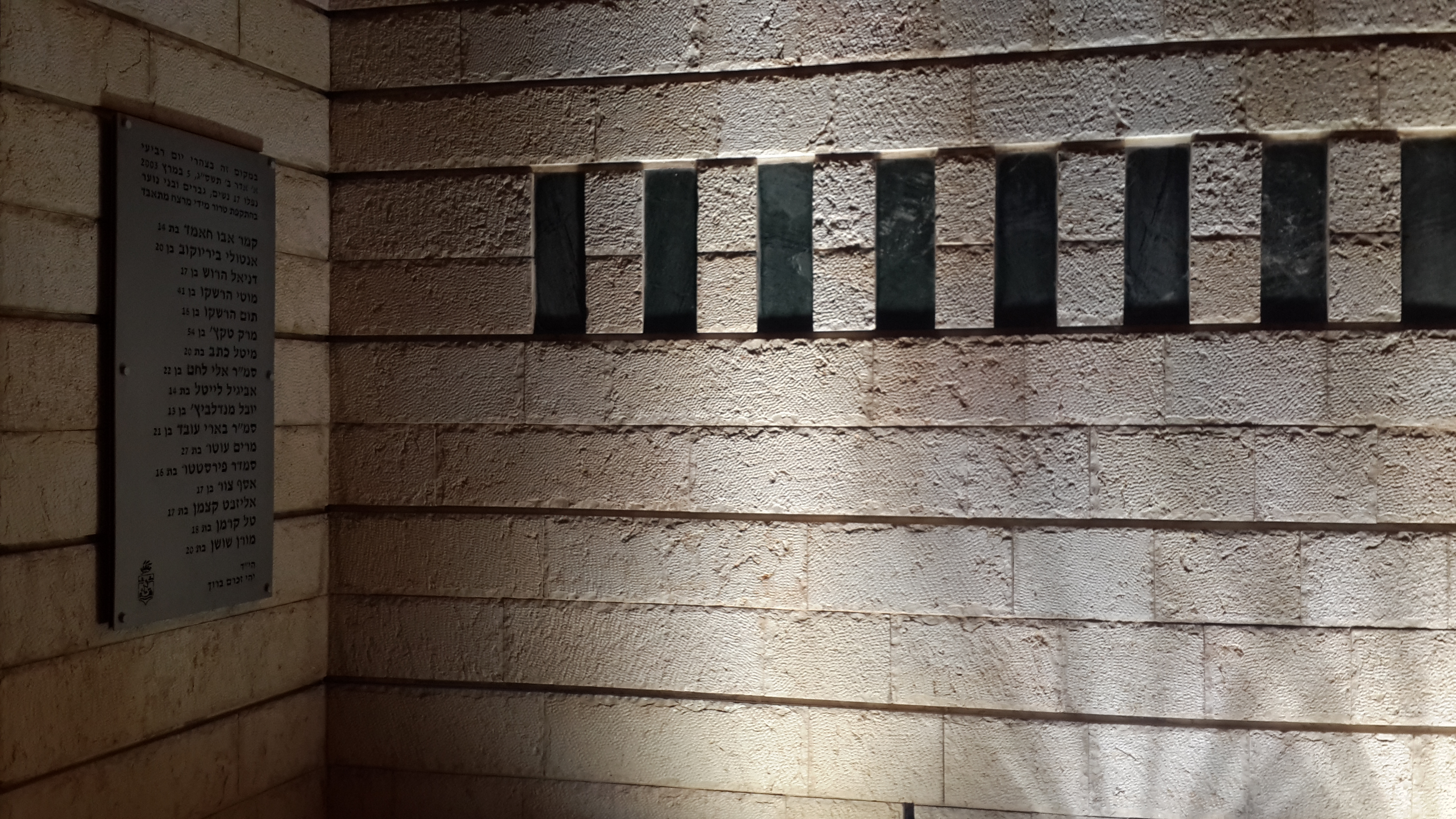 האנדרטה לזכר נרצחי הפיגוע בקו 37 בחיפה